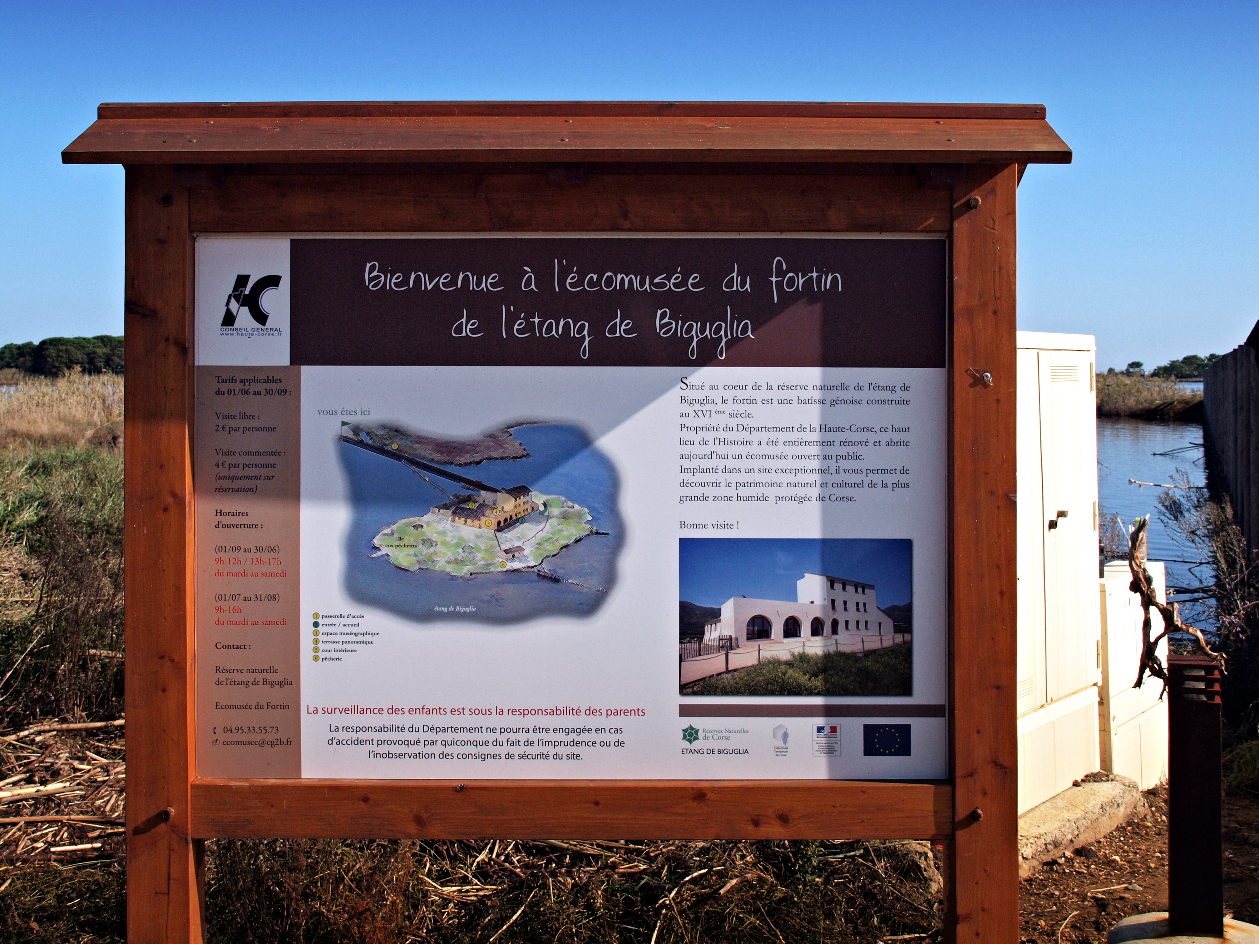 Furiani (Corse) - Panneau d'accueil à l'écomusée du fortin de l'étang de Biguglia